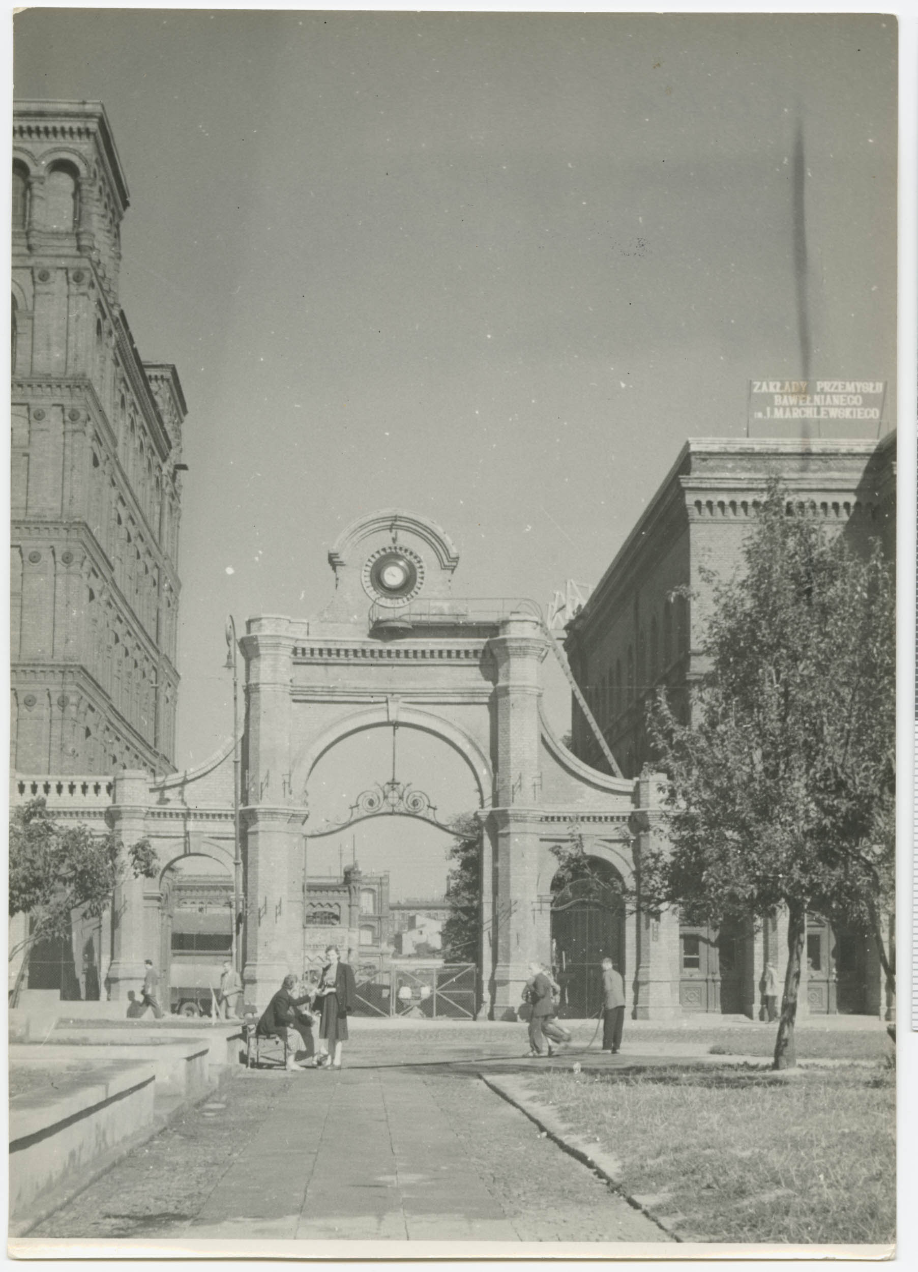 Fotografia Ignacego Płażewskiego przedstawiająca bramę do dawnej fabryki Izreala Kalmanowicza Poznańskiego. W momencie powstawania zdjęcia były to Zakłady Przemysłu Bawełnianego im. Juliana Marchlewskiego. Brama umieszczona była pomiędzy budynkiem kantoru i przędzalni. Pierwszy właściciel zakładów Izrael Kalmanowicz Poznański rozpoczynał swoją działalność w Łodzi w latach 50. XIX w. W 1872 r. stał się właścicielem dużego terenu przy ulicy Ogrodowej, gdzie postawił tkalnię, a kilka lat później w latach 1876-1878 wybudował widoczną we fragmencie na zdjęciu czteropiętrową przędzalnię. Tradycyjnie przypisuje się autorstwo projektu architektonicznego Hilaremu Majewskiemu, lecz doniesienia prasowe świadczą o tym, że autorem mógł być jednak Juliusz Jung. Po II wojnie światowej fabryka została znacjonalizowana. Upadłość fabryki ogłoszono w 1991 r. Poddana rewitalizacji od 2006 r. mieści na swoim terenie Centrum Handlowe „Manufaktura”.